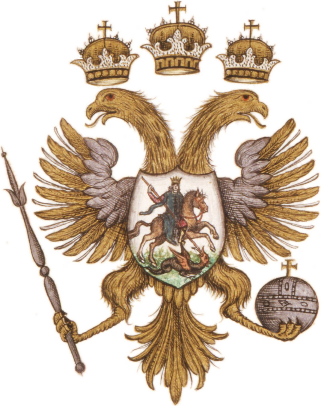 Герб с государственной печати царя Алексея Михайловича 1667 г. (из царского титулярника).